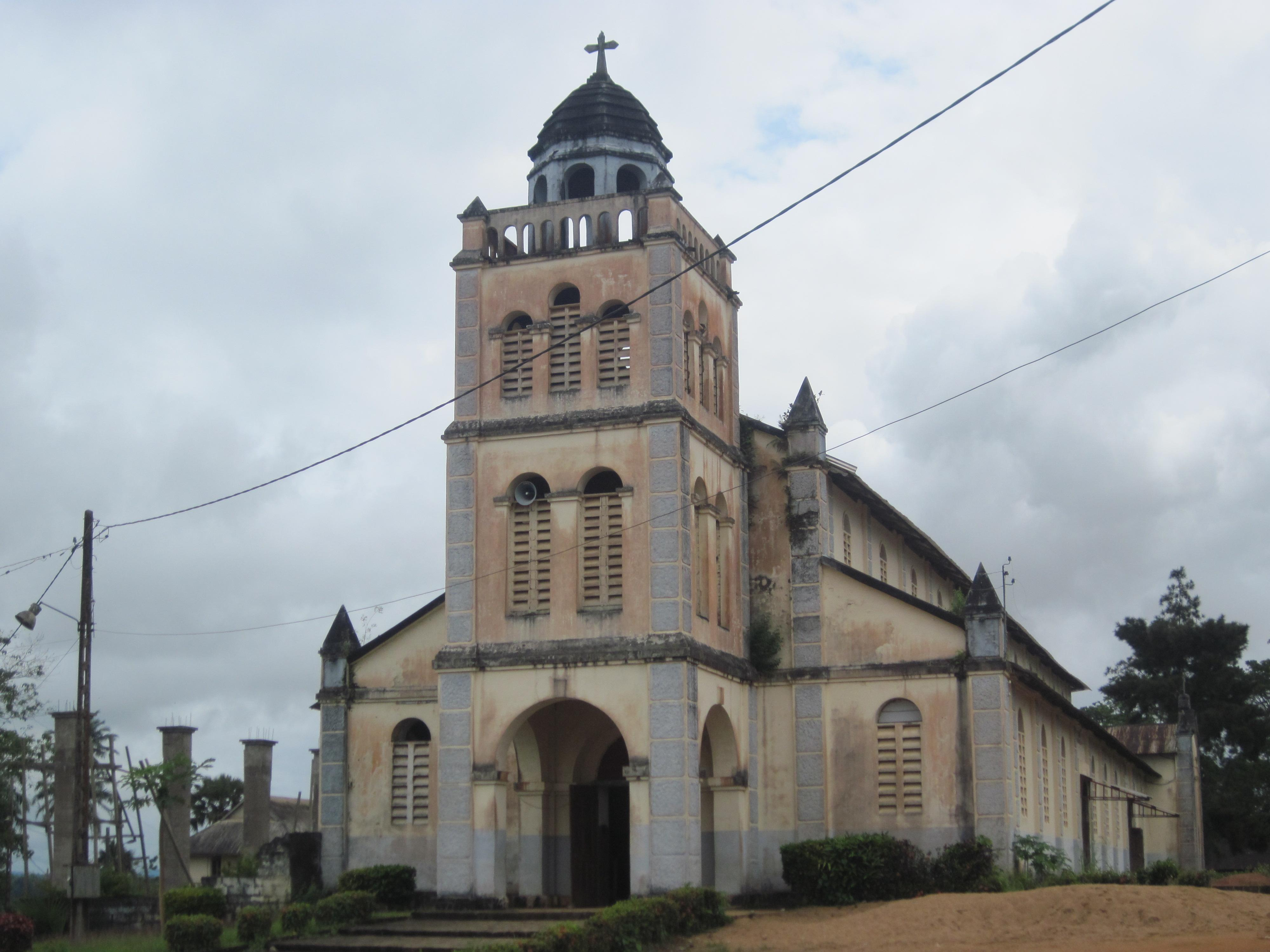 Prise sur la route venant de Mbanda